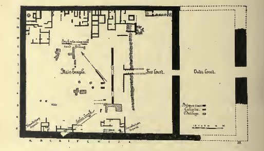 Plan des unvollständig ausgegrabenen Areals des Totentempels Thutmosis' III. nördlich des Ramesseums (Henket-anch). Ausgrabung von Arthur Weigall (späterer Ausgräber war Herbert Ricke).